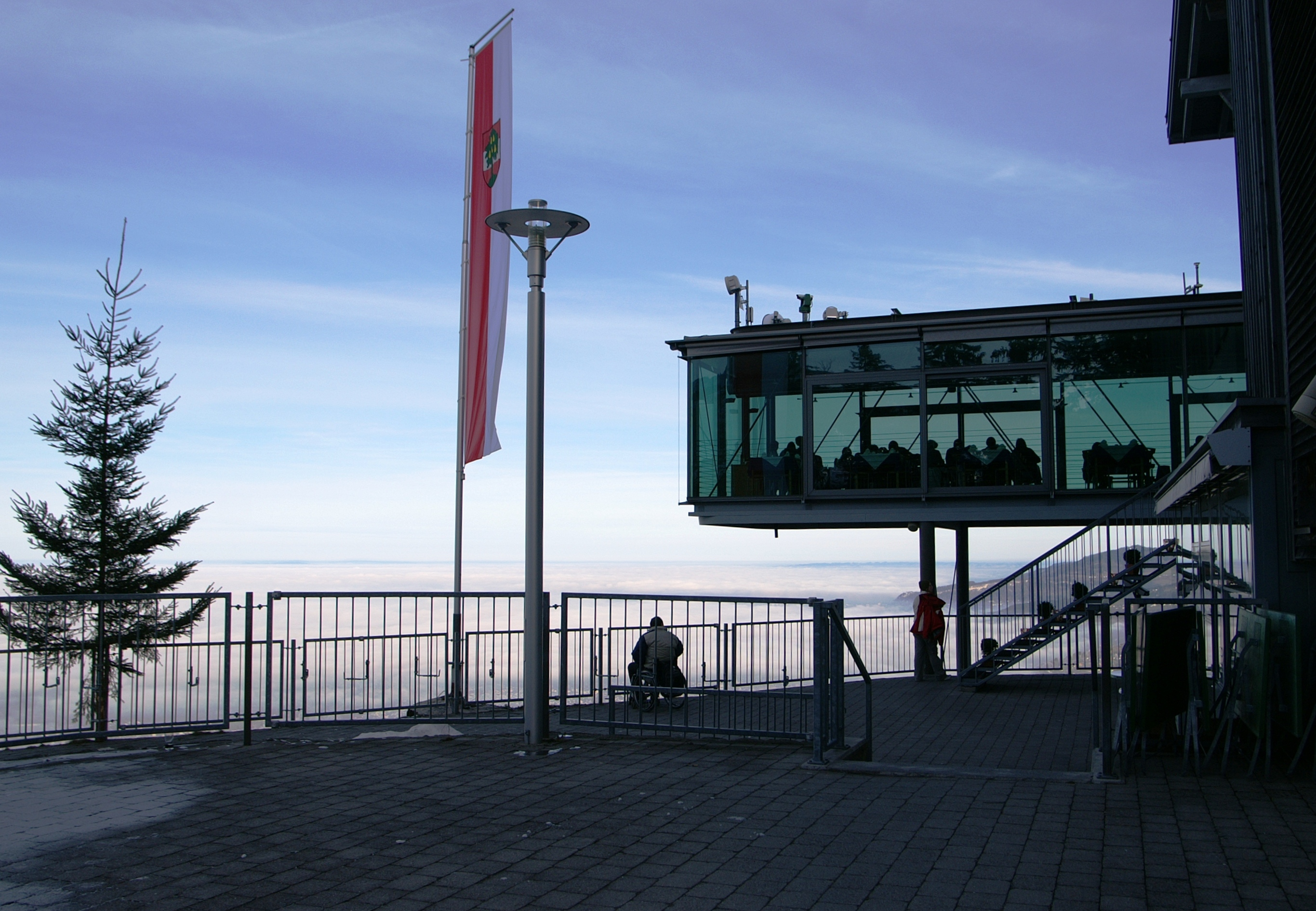 Panorama-Restaurant der Karrenseilbahn (Karren (Berg) 976m)